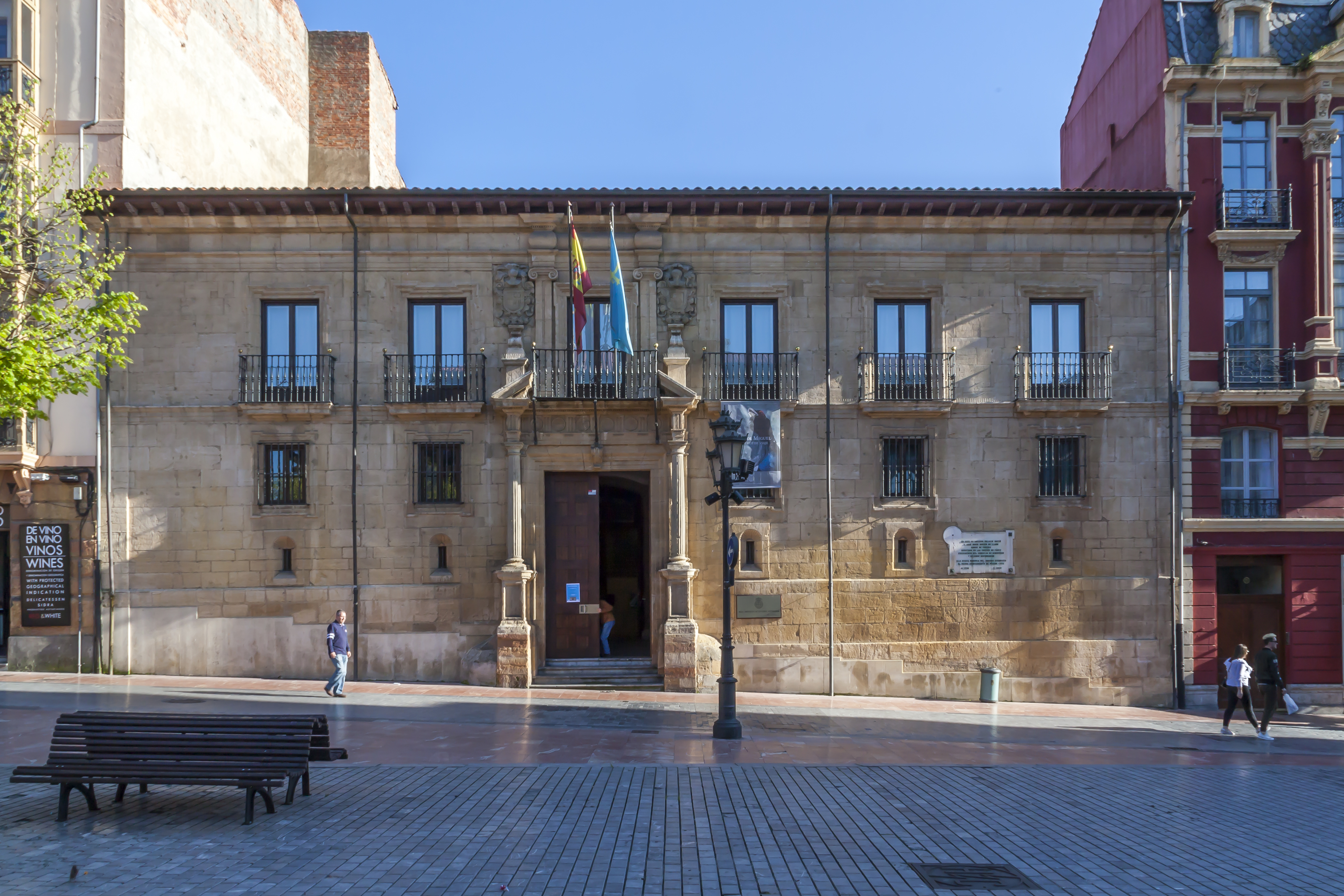 Oviedo, de ayer a hoy.